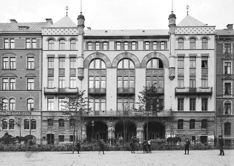 Folkets hus, Barnhusgatan 14 från Norra Latinläroverkets skolgård. Byggnadsår 1898-1902. Arkitekter Ullrich & Hallquisth